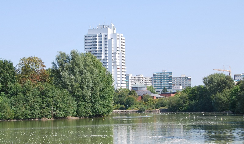 Mettenhof